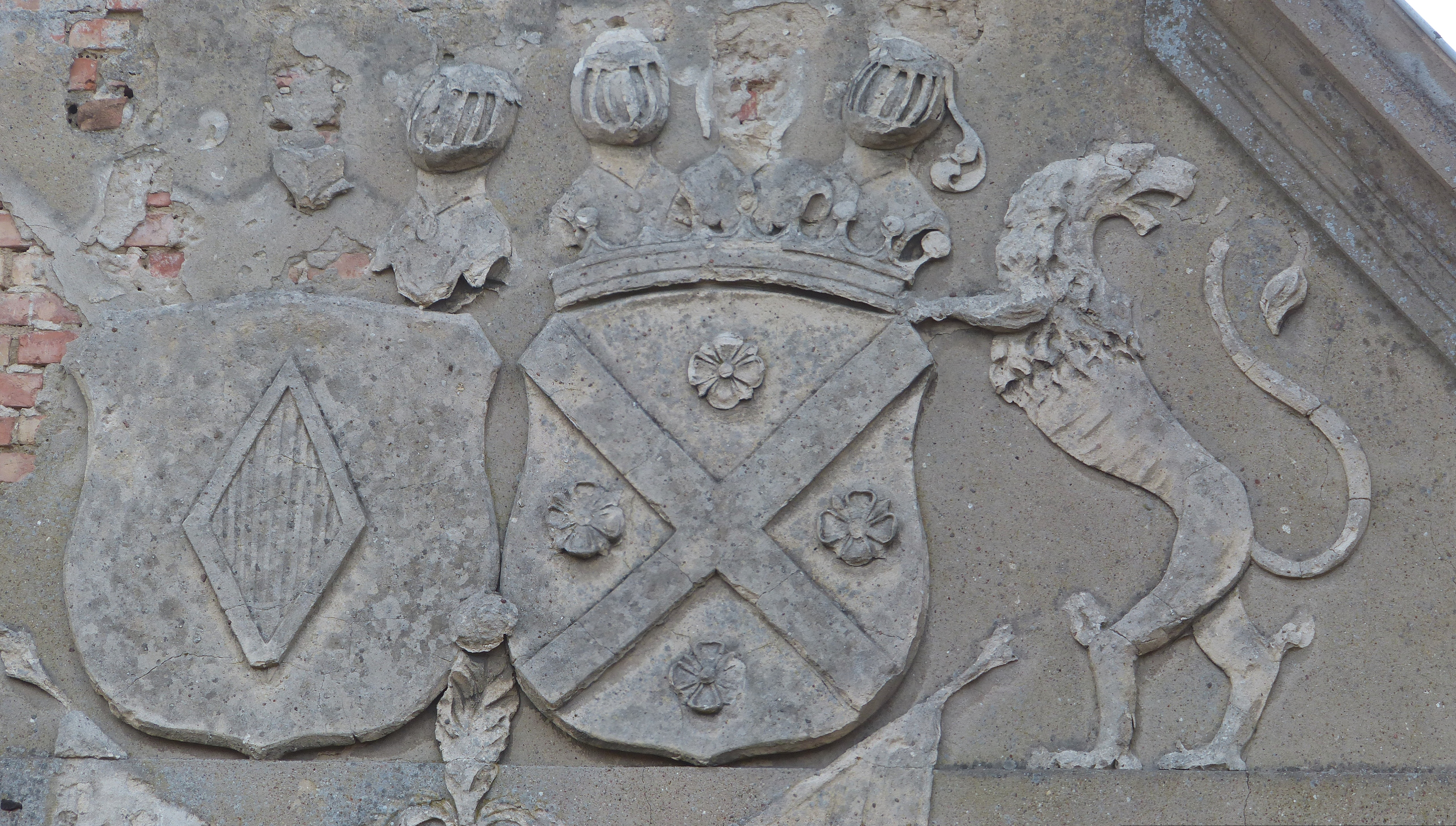 Gutshaus Dargibell, Reste des Allianzwappens der Familien von Schwerin und von Kanitz